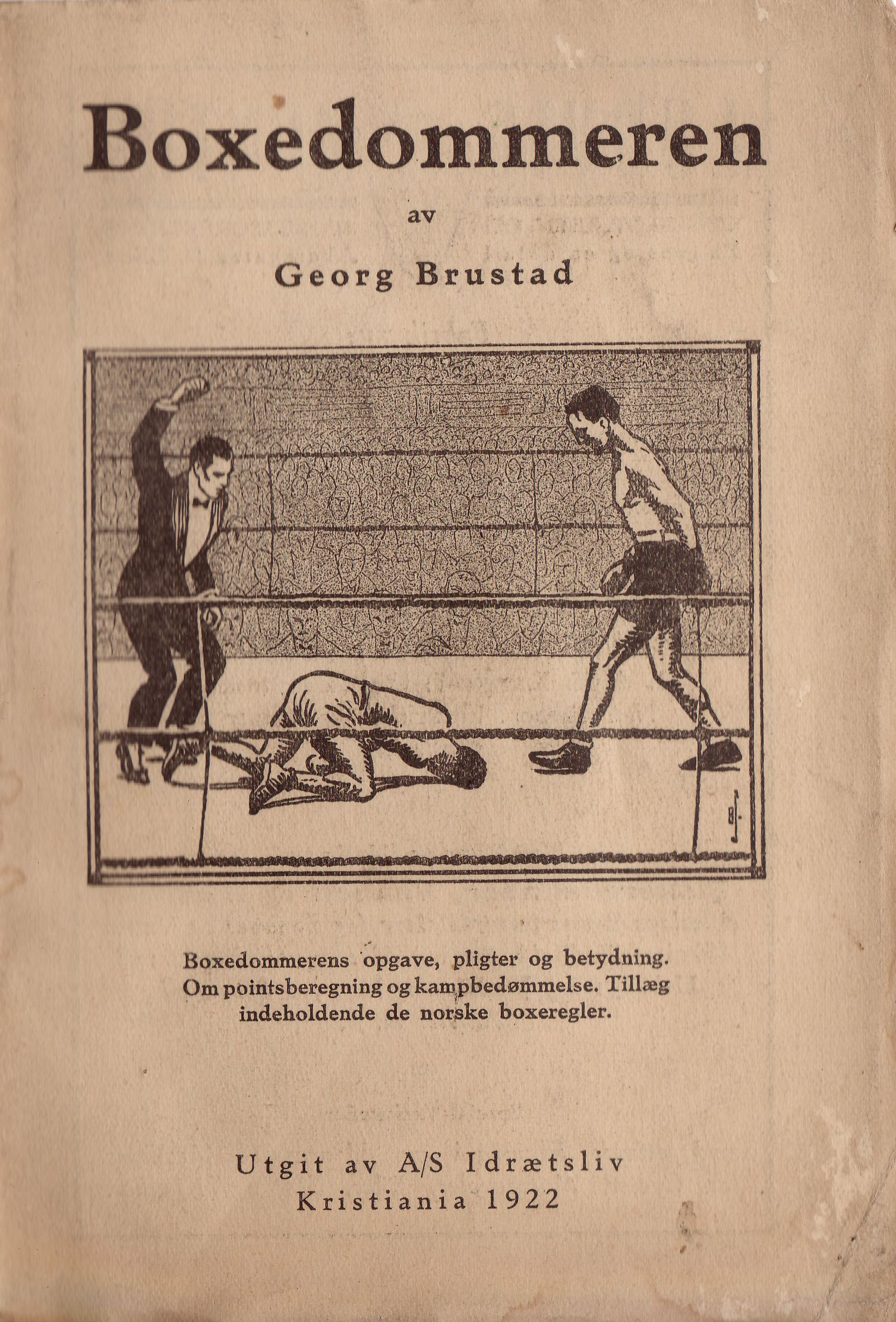 Forside til Boxedommeren